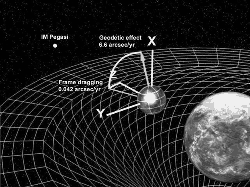 Prinzip des Gyroskops in Gravity Probe B